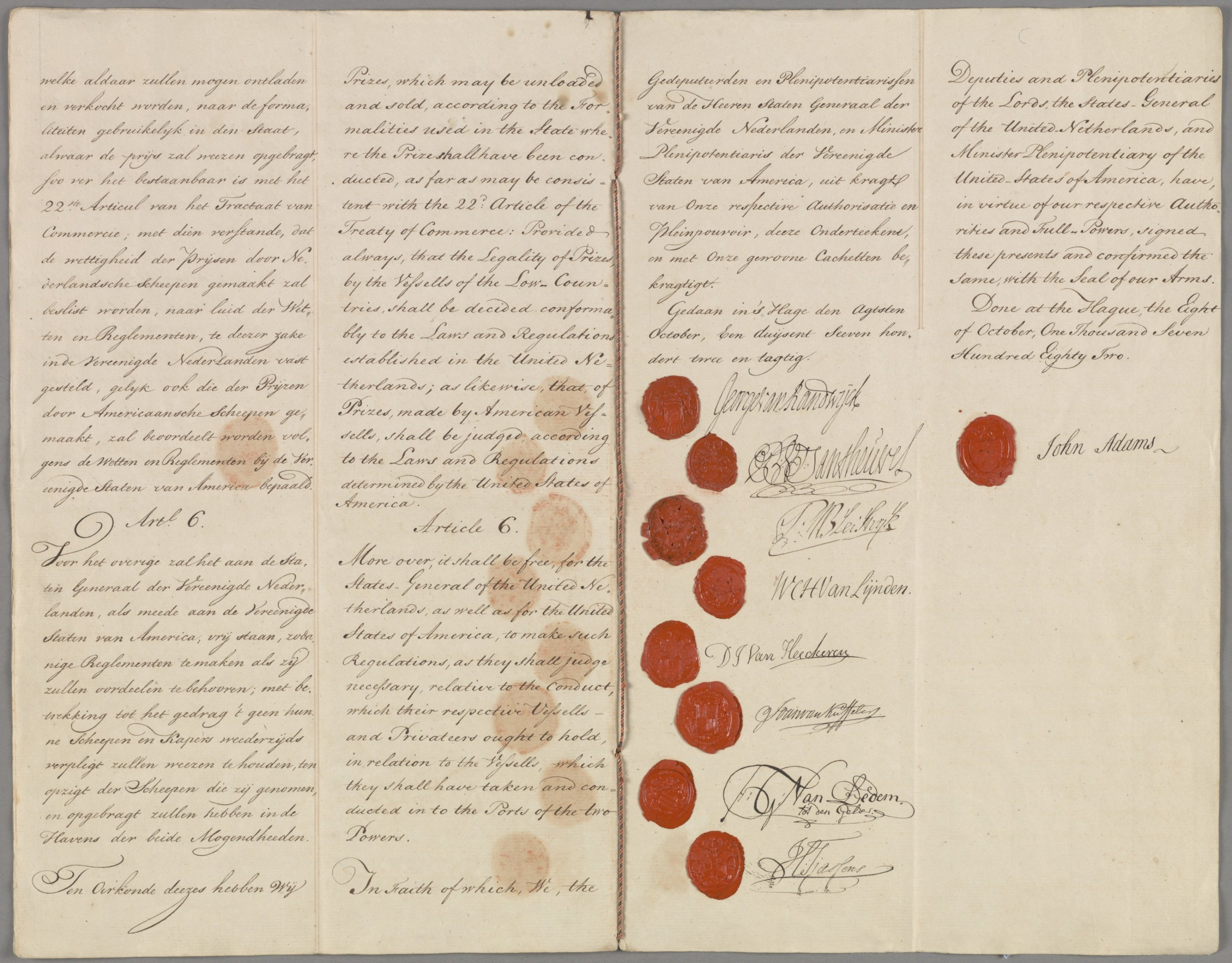 Akte van traktaat van vriendschap en commercie met een separate conventie te 's-Gravenhage gesloten tussen de Staten-Generaal en de Verenigde Staten van Amerika. Met bijlagen, 1780, 1782. 8 oktober 1782